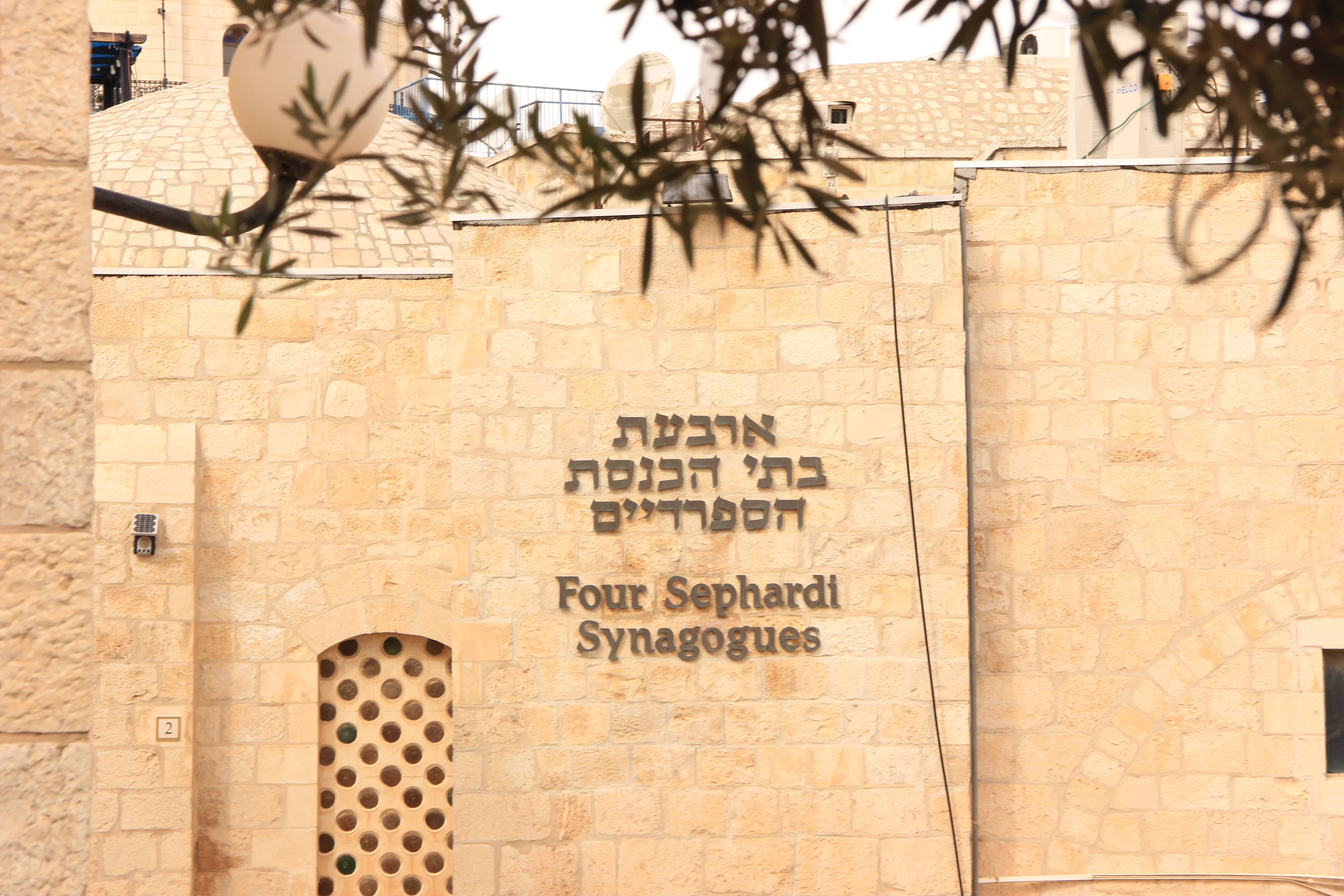 בית הכנסת אליהו הנביא שימש כתלמוד תורה ובית מדרש לילדי היהודים הספרדיים בירושלים, ובחגים ושבתות התפללו בו האשכנזים. שמו ניתן לאחר שבאחד מימי יום כיפור הופיע איש פלאי שהשלים מניין ונעלם בצאת הצום. המתפללים האמינו כי היה זה אליהו הנביא ועד היום מוצב הכיסא שעליו ישב במערה בפינת בית הכנסת.